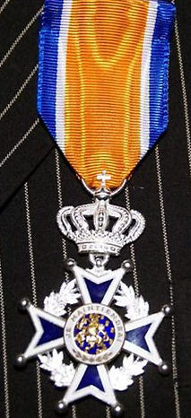 Orde Ridder van Oranje-Nassau